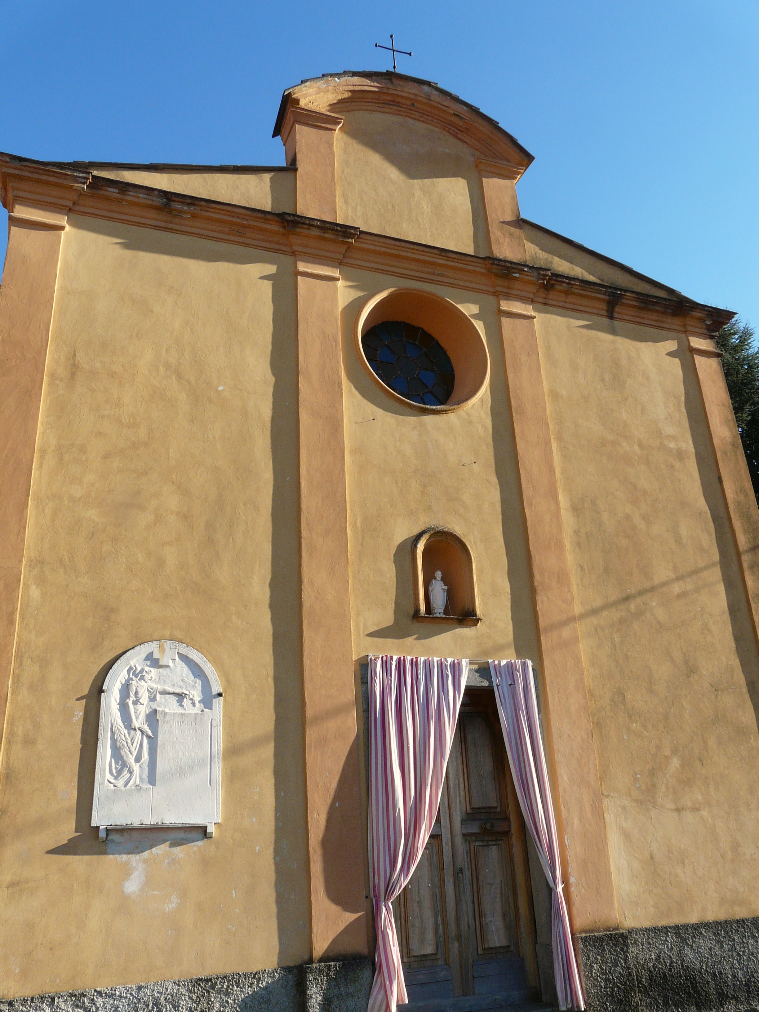 Facciata della chiesa di San Nicola di Bari, Ripalta, Borghetto di Vara, Liguria, Italia